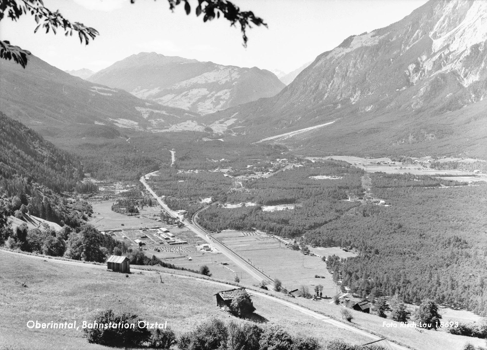 Ötztal-Bahnhof gegen Westen